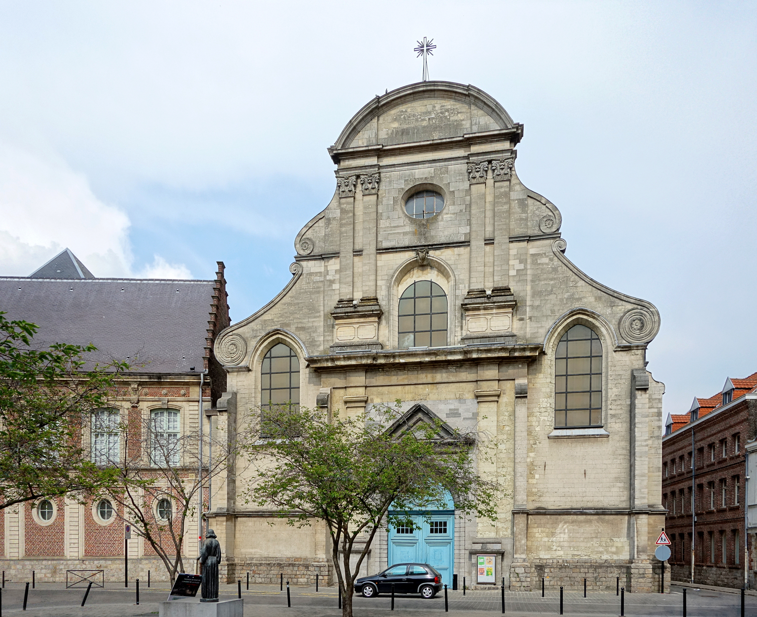 L'église Saint Nicolas de l'ancien collège des Jésuites de Valenciennes.